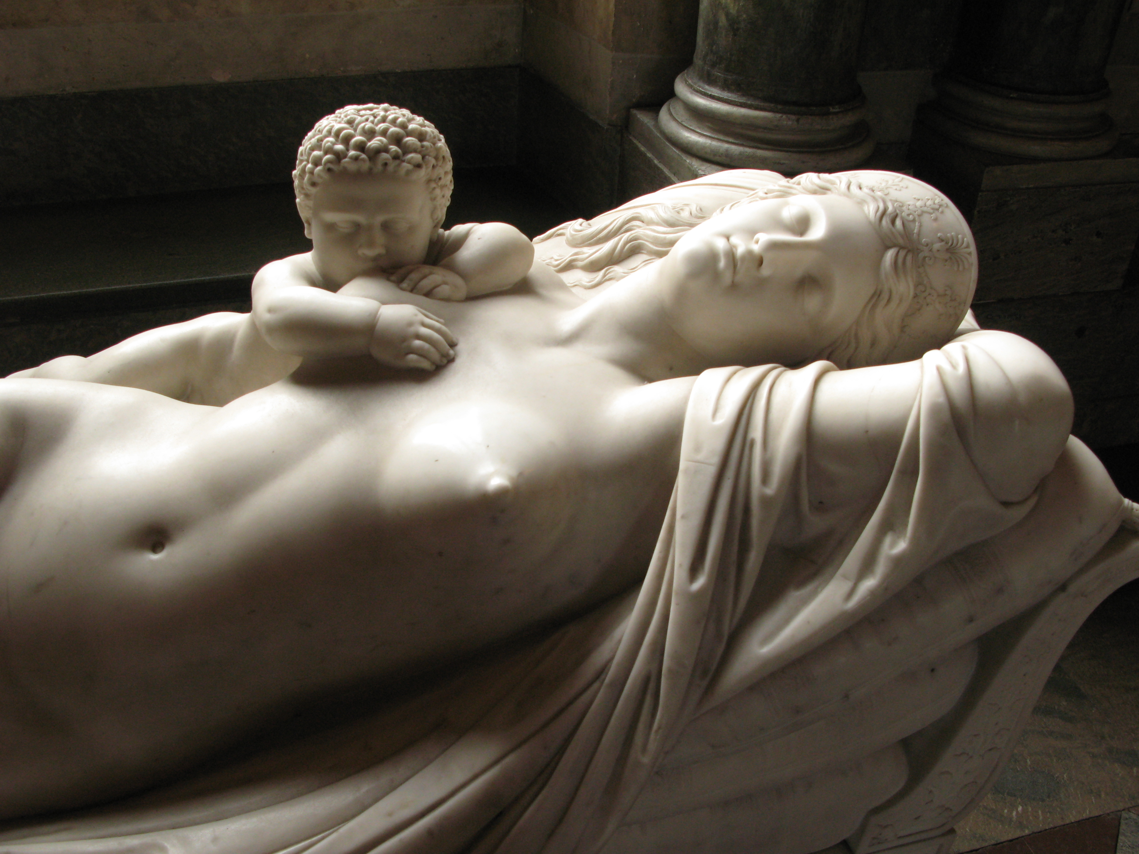 Juno med Herkulesbarnet, Johan Niclas Byström